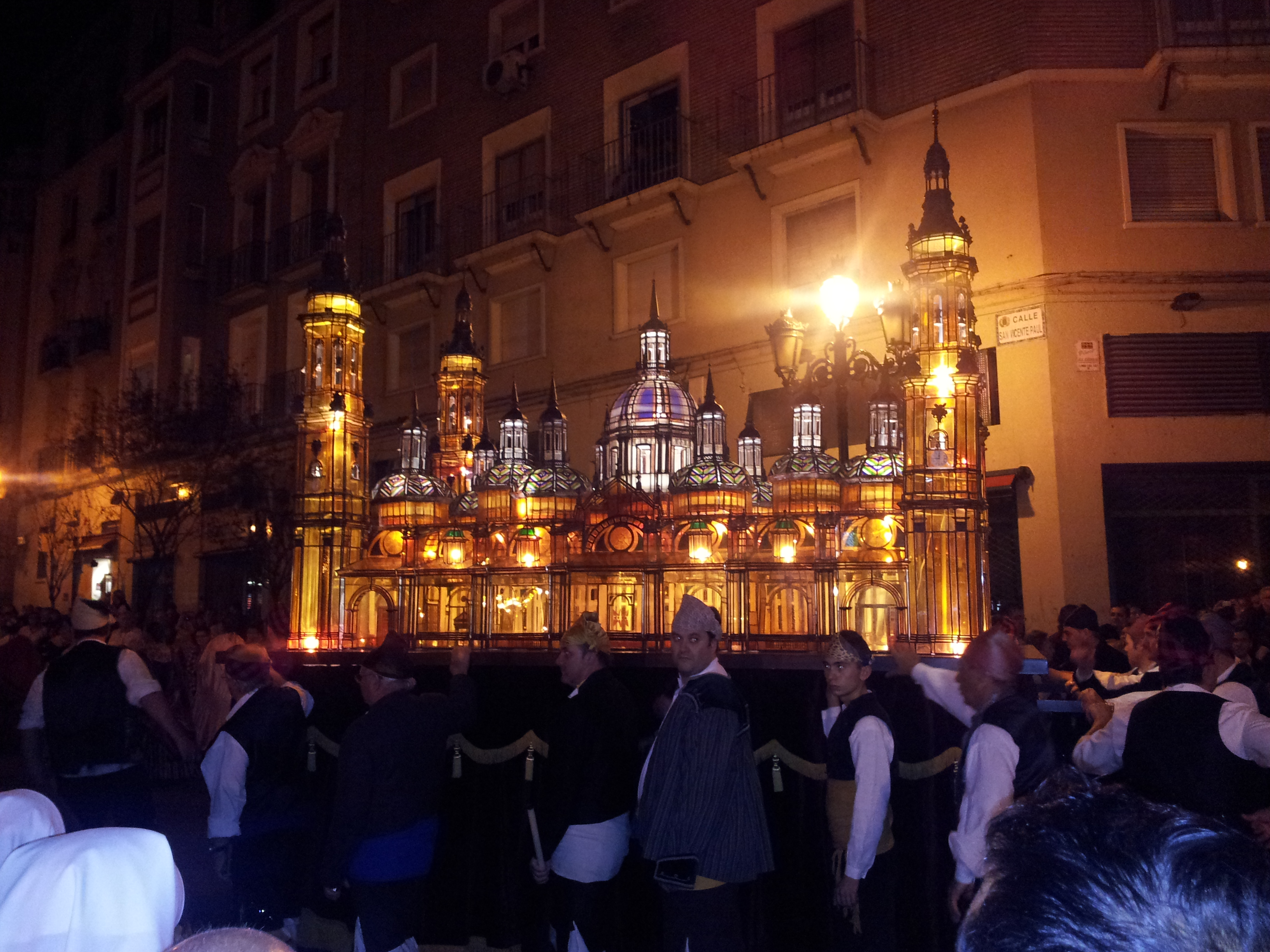 Barrio de la Seo de Zaragoza